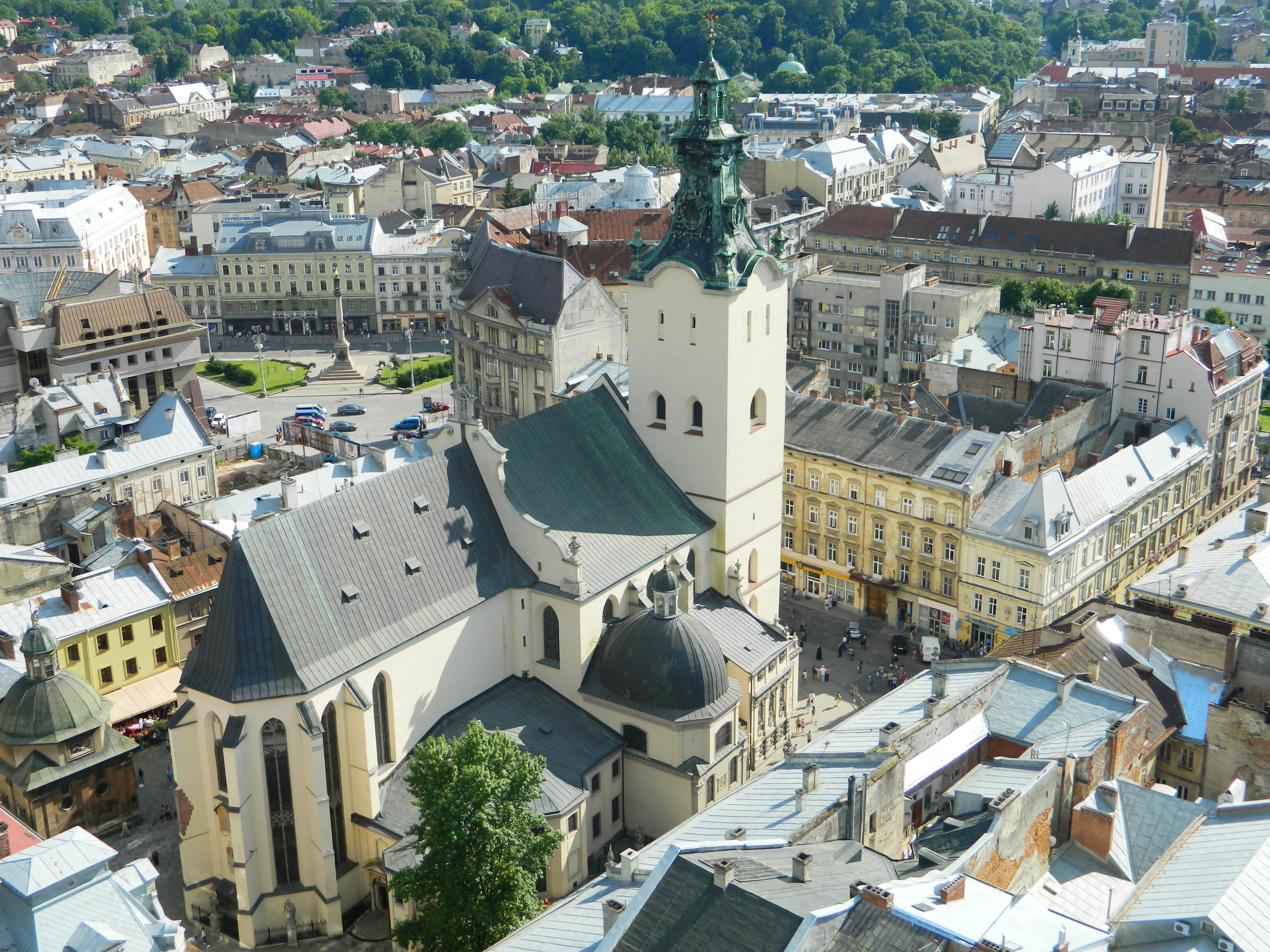 Латинский кафедральный собор, 2014 год